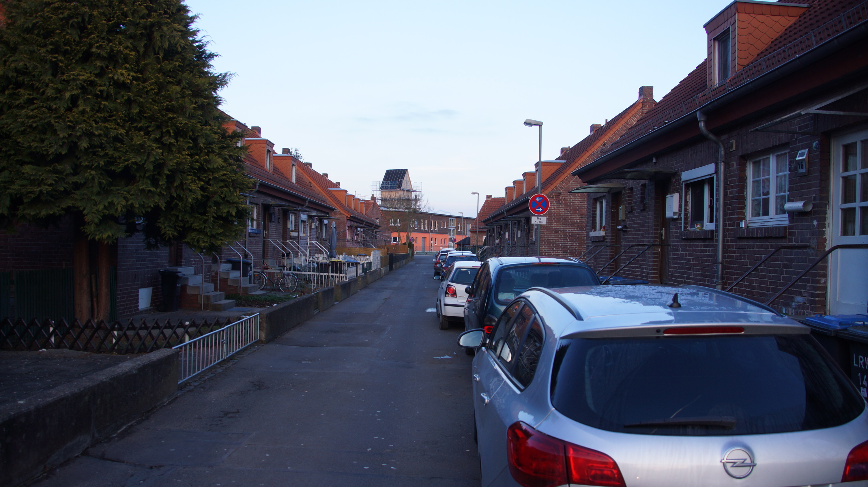 Die sogenannte Gummiinsel im Läufertsröderweg in Gießen